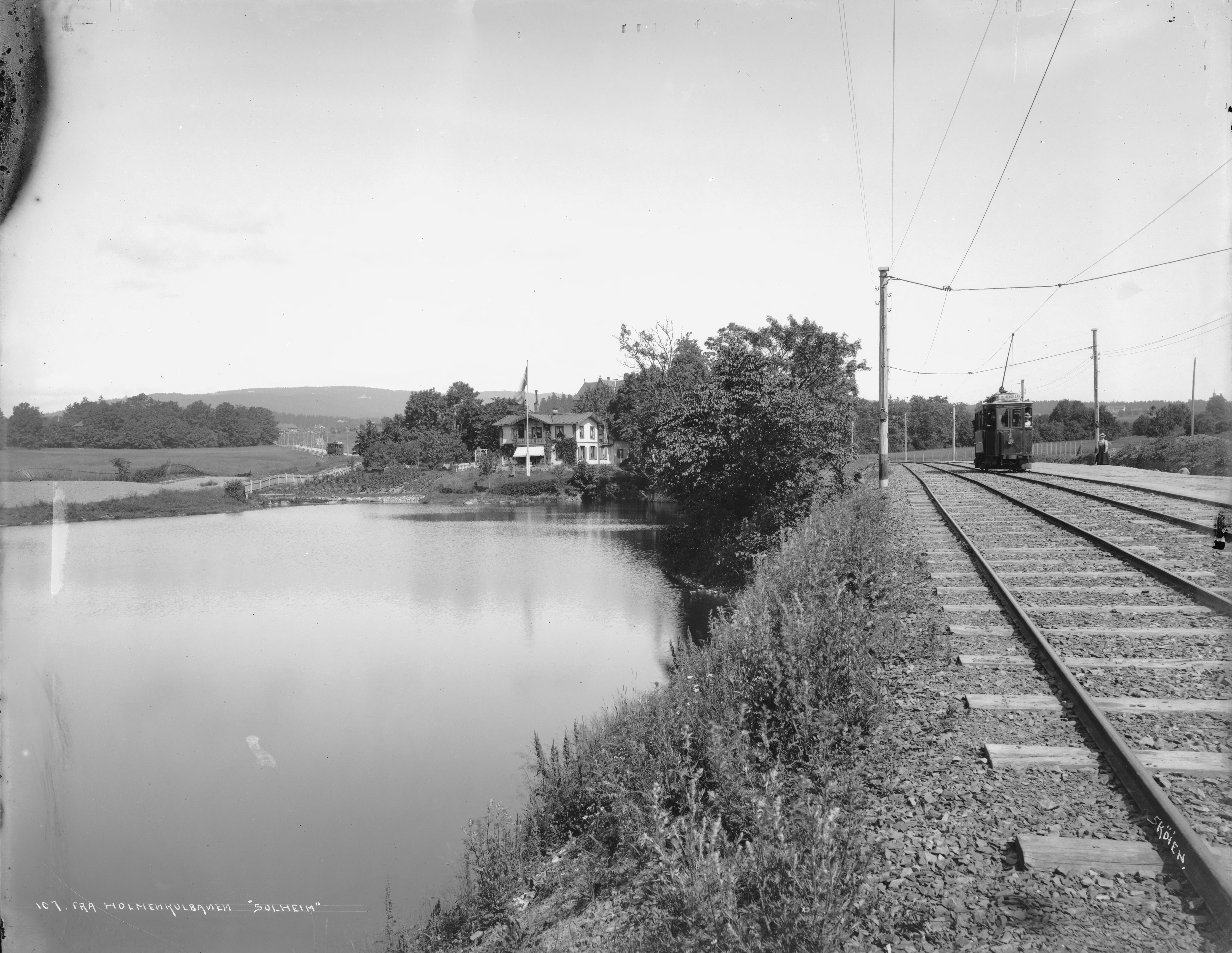 Påskrift negativ: 107. Fra Holmenkolbanen. Solheim. Skøien Påskrift konvolutt: B-46 V.Aker. (Frøen) Slemdalsveien 36. Solheim[Riksantikvaren] Sted: Frøen,Vestre Aker,Øvre Frønsdammen Kommune: Oslo Fylke: Oslo Tagger: landskap Solheim vann sporvogn trikk Holmenkollbanen